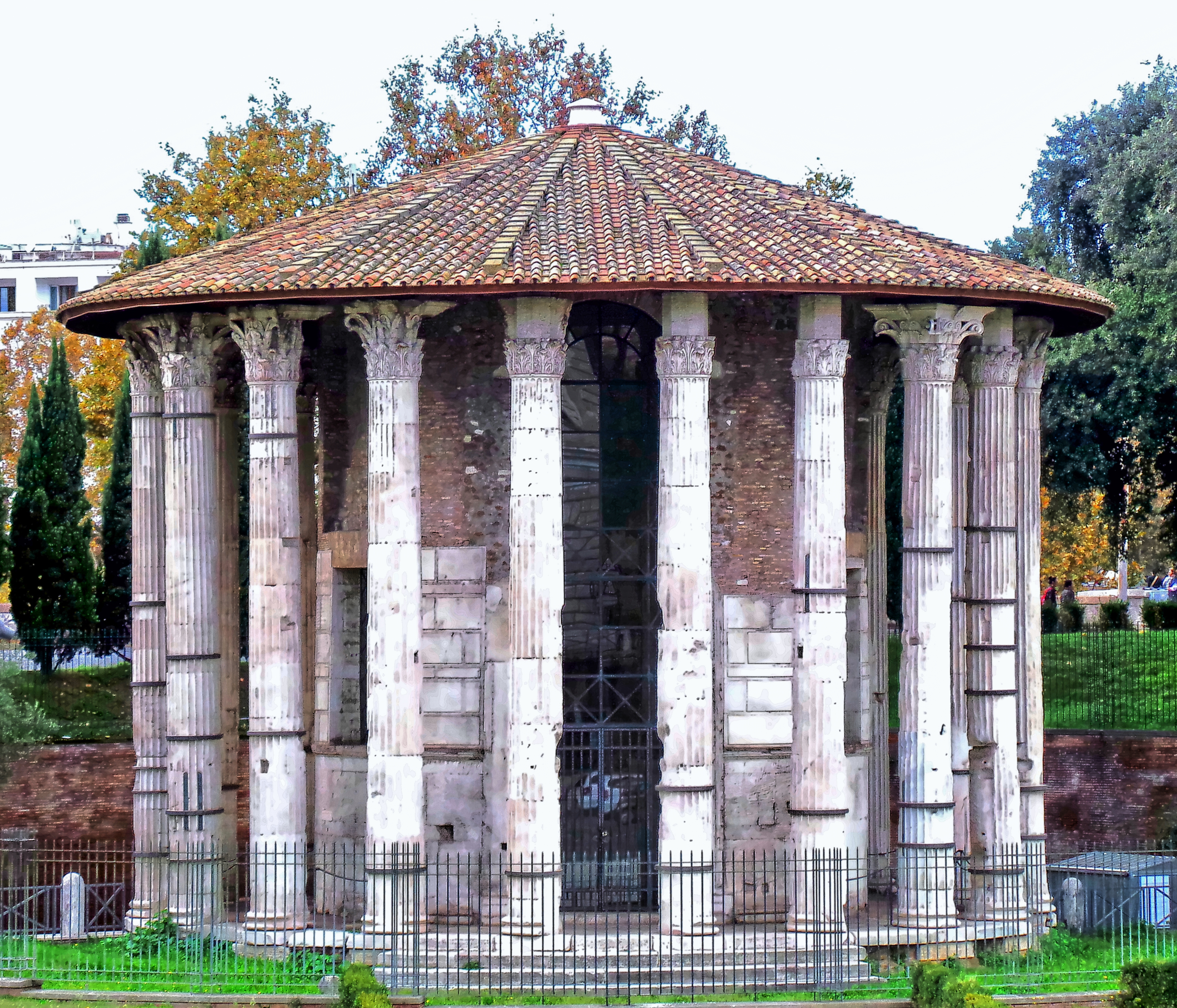 Frontansicht vom Tempel des Victor in Rom